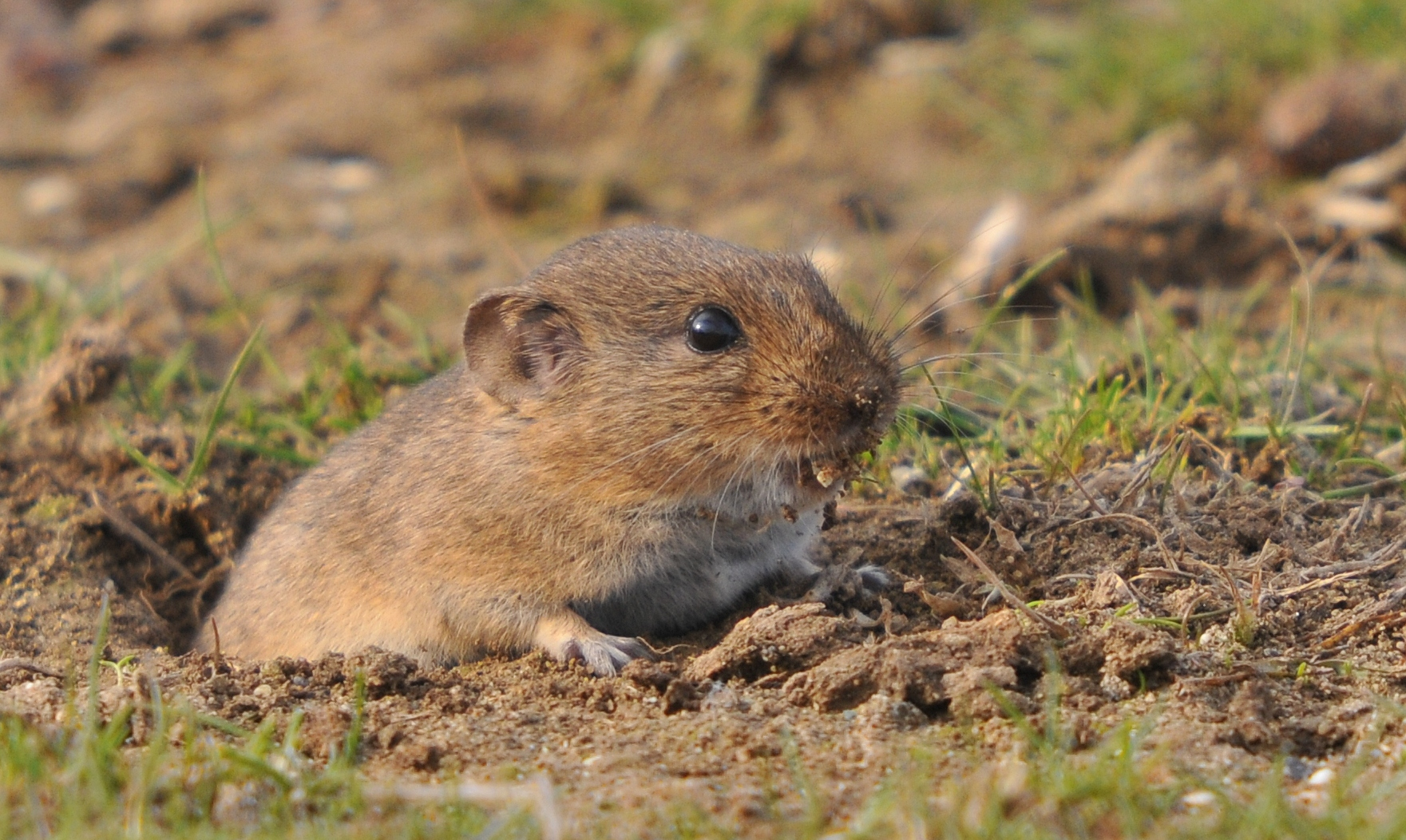 Kurdî: En:Guenther’s Vole